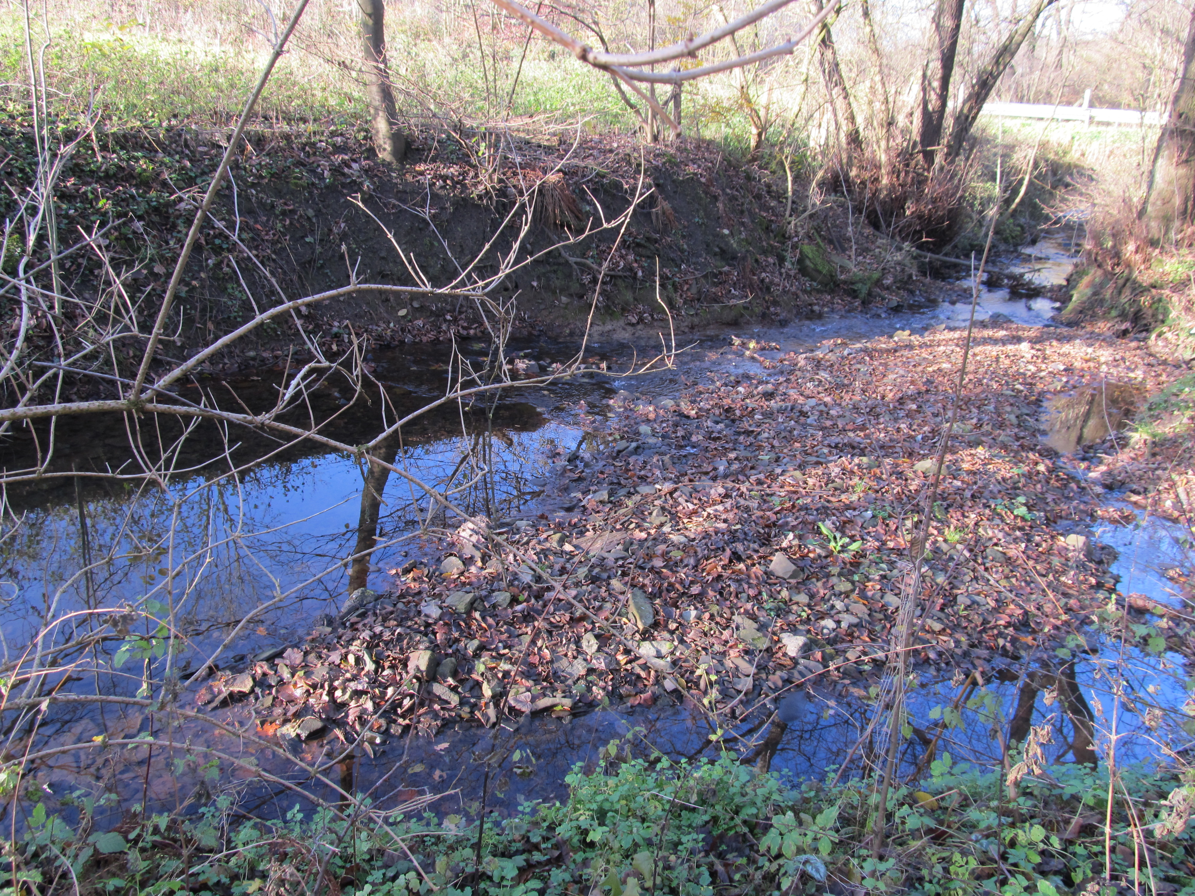 Kiesbänke 29.11.11